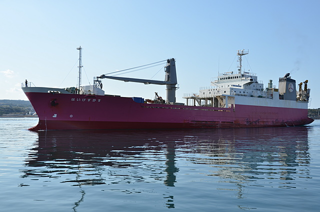 フェリー・はいびすかす。西之表港内にて。